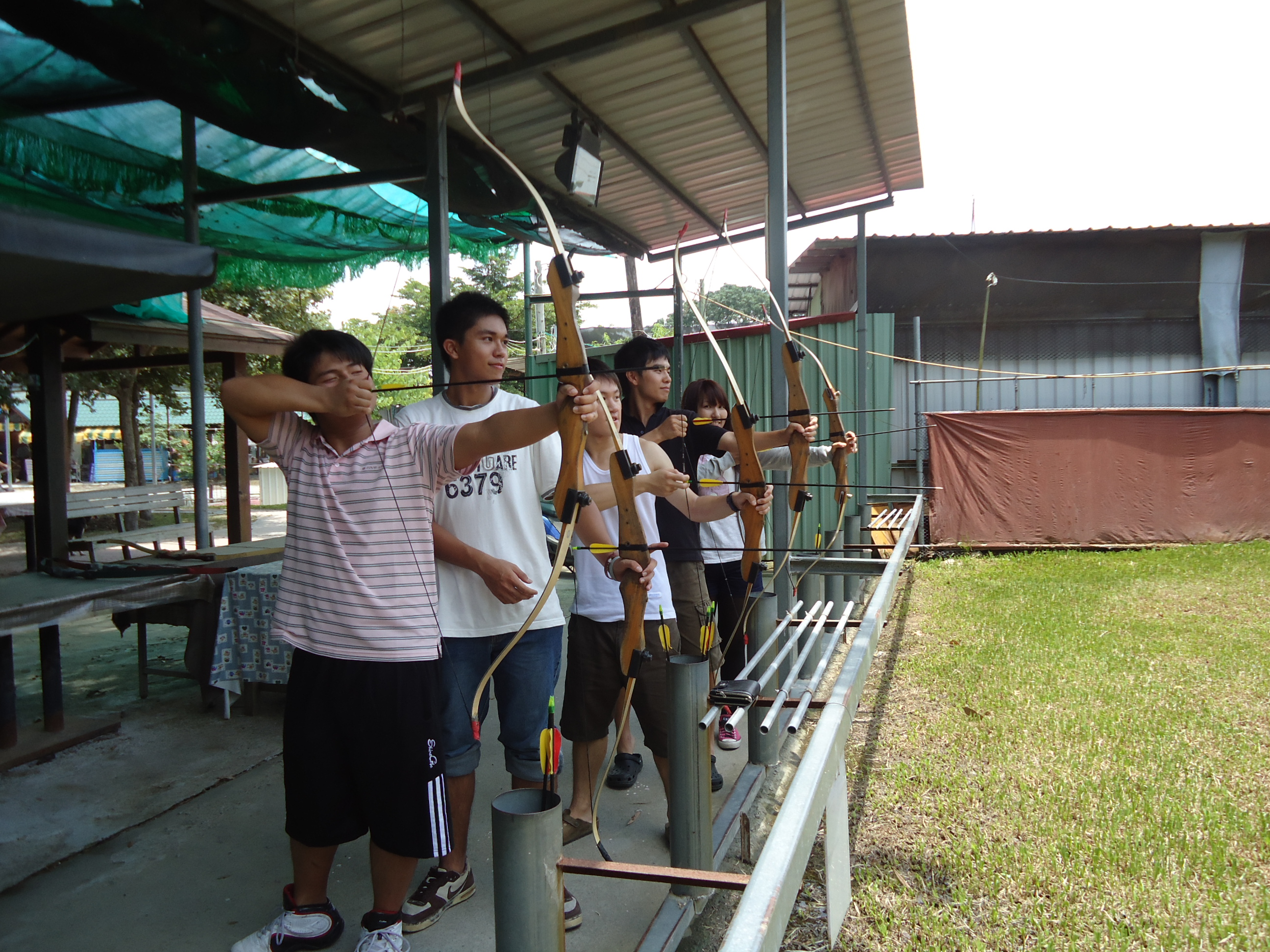 中文（台灣）: 臺中東豐的射箭練習場。